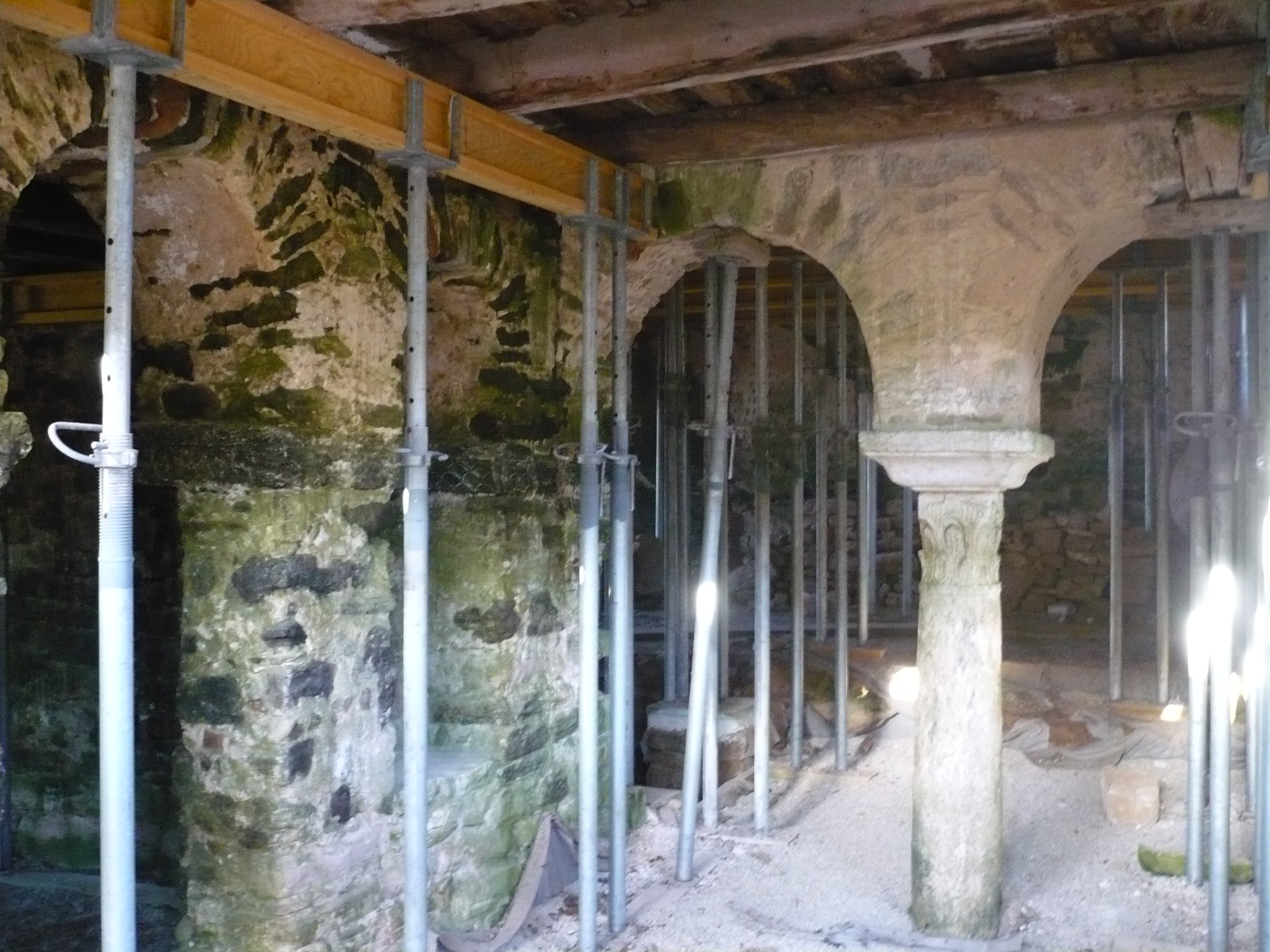 Igreja de São Gião da Nazaré - obras de restauro